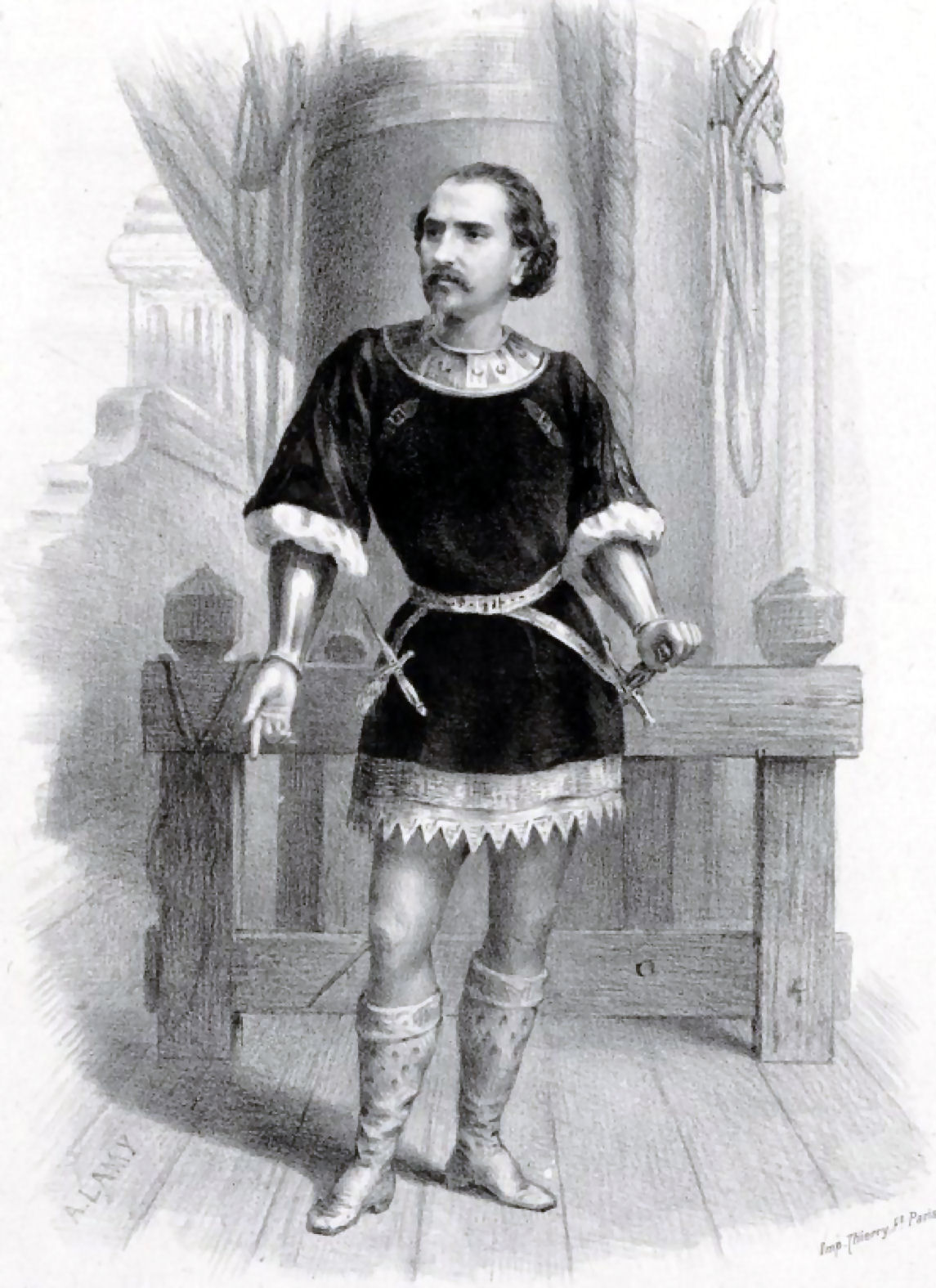 Emilio Naudin dans le rôle de Vasco de Gama dans L'Africaine de Meyerbeer